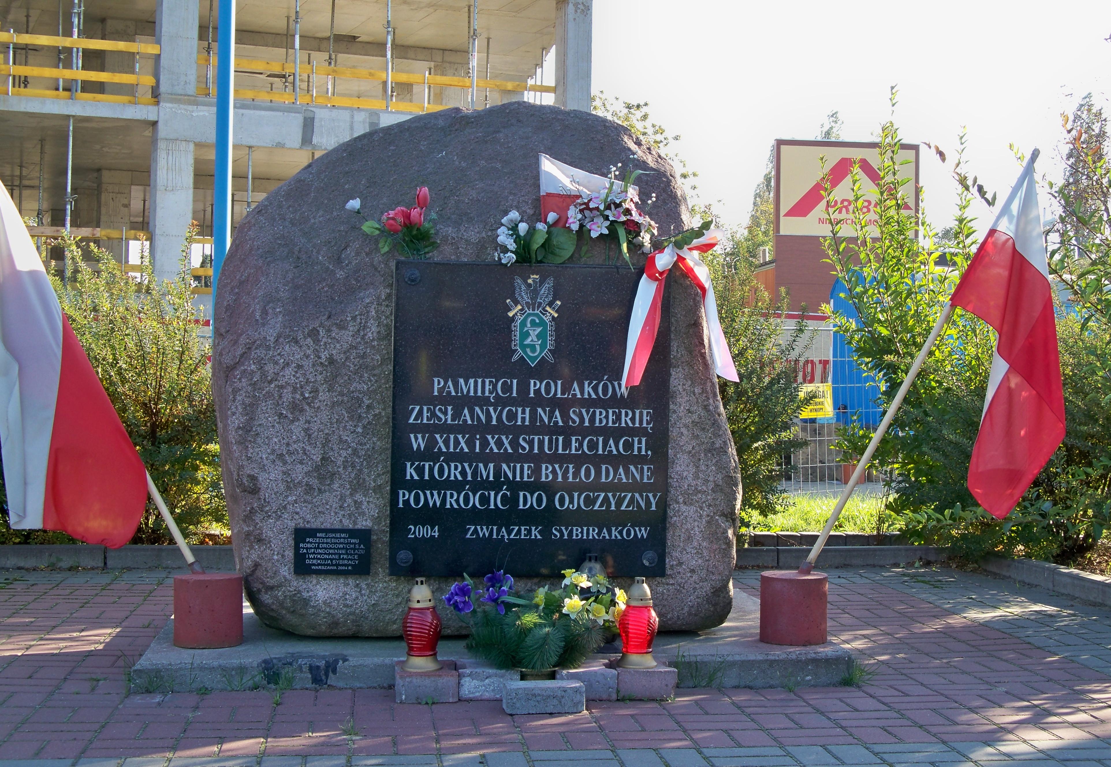 Kamień ku czci pamięci zesłańców syberyjskich przy rondzie ich imienia w Warszawie.